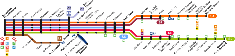 Mapa de la Línia Barcelona-Vallès operada por FGC